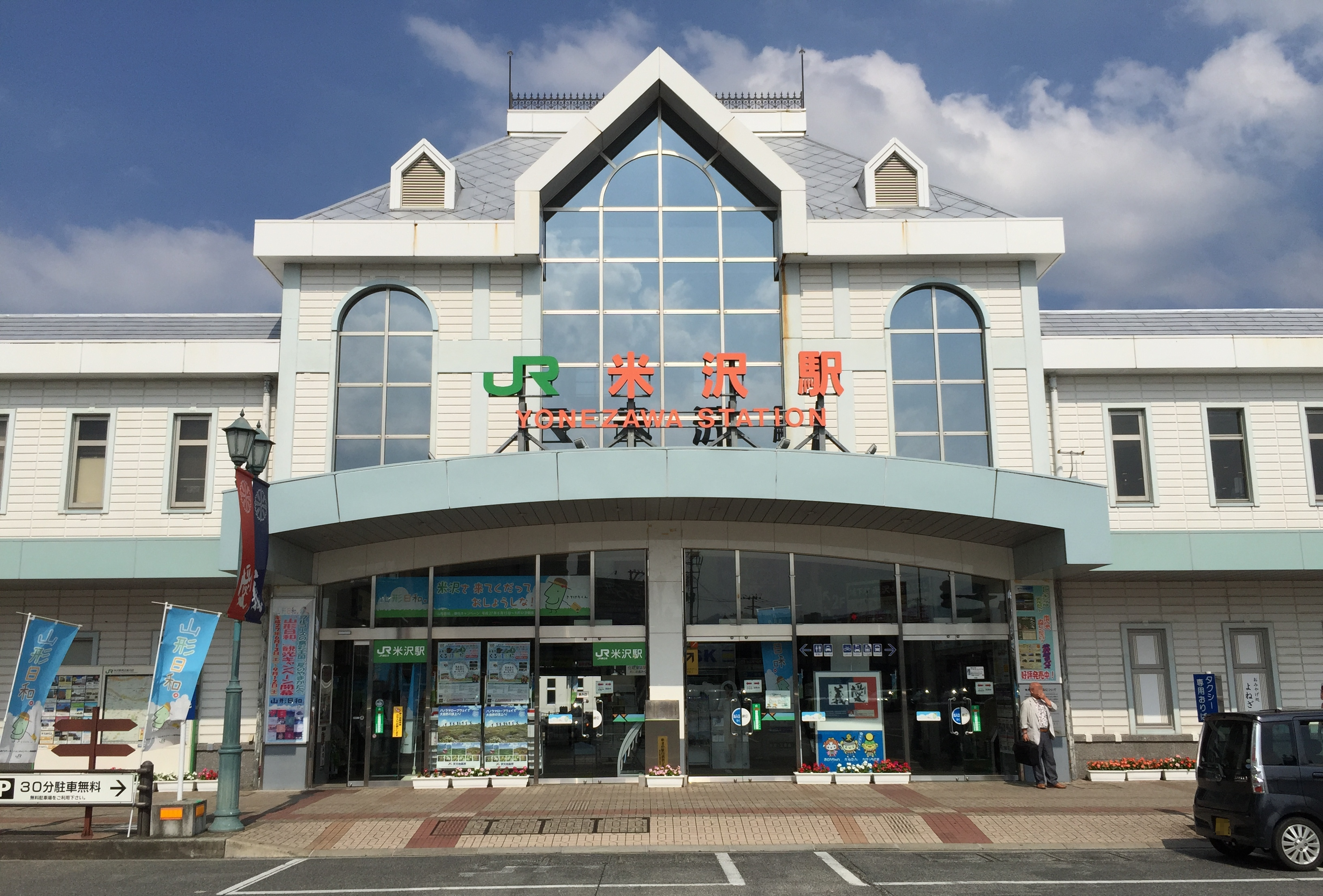 米沢駅西口